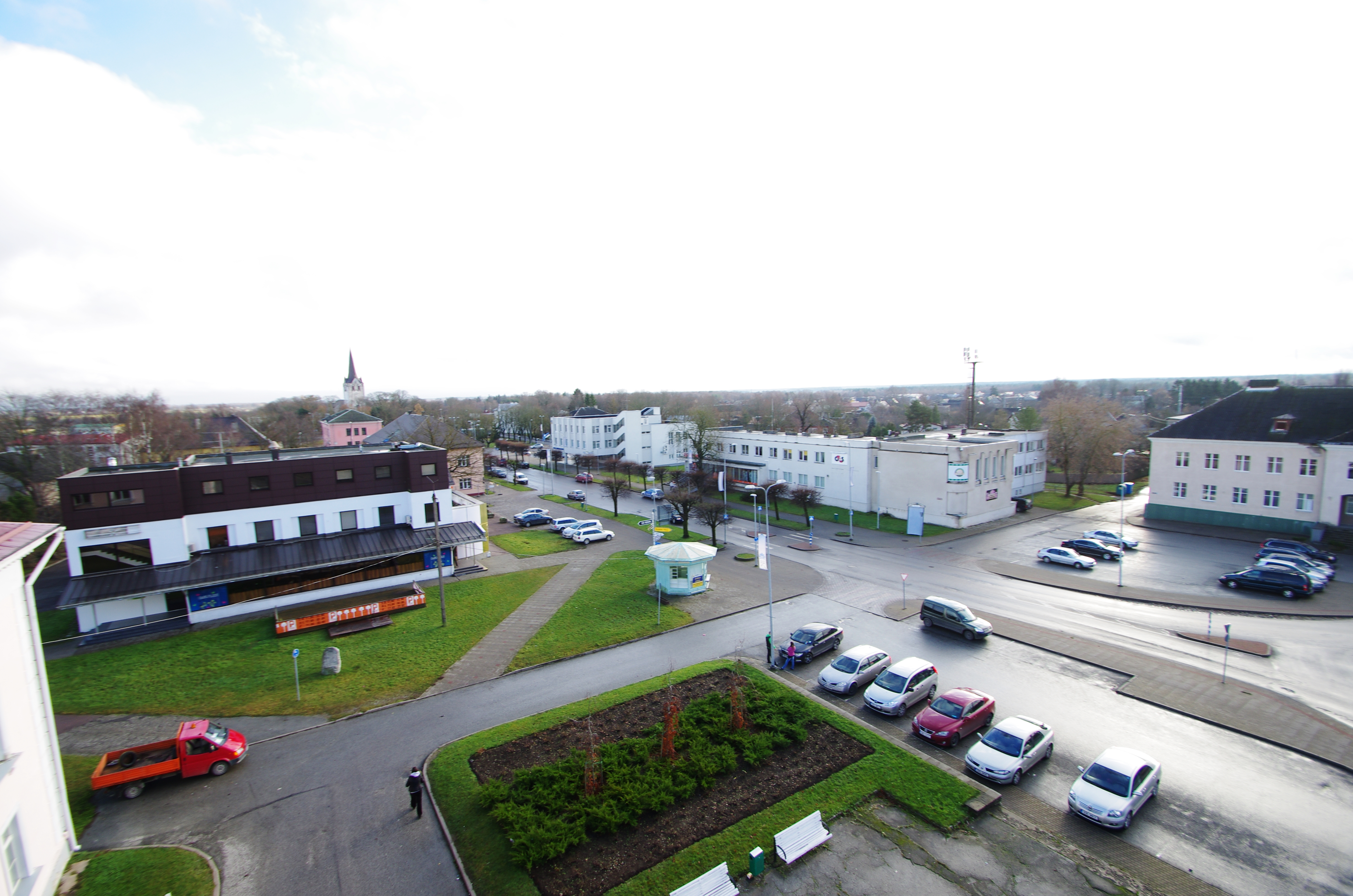 Keila linnavaade